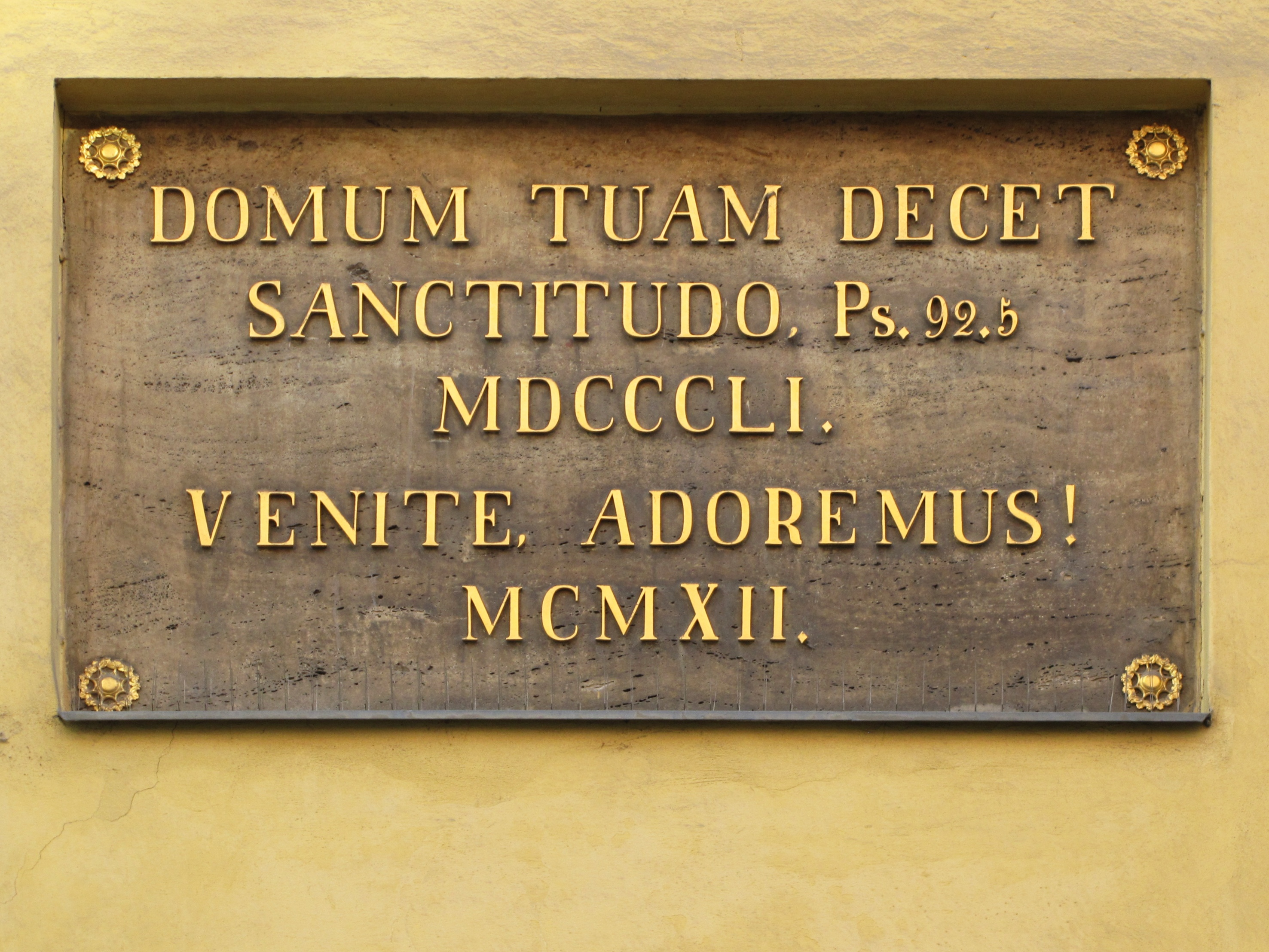 Latinský nápis nad vchodem do kostela svaté Máří Magdalény v Brně s textem: Domum tuam decet SANCTITUDO Ps 92,5 MDCCCLI Venite Adoremus MCMXII (česky: Tvému domu přísluší SVATOST Ž 92,5 (Žalm 92, verš 5) 1851 Pojďte a klanějme se 1912)